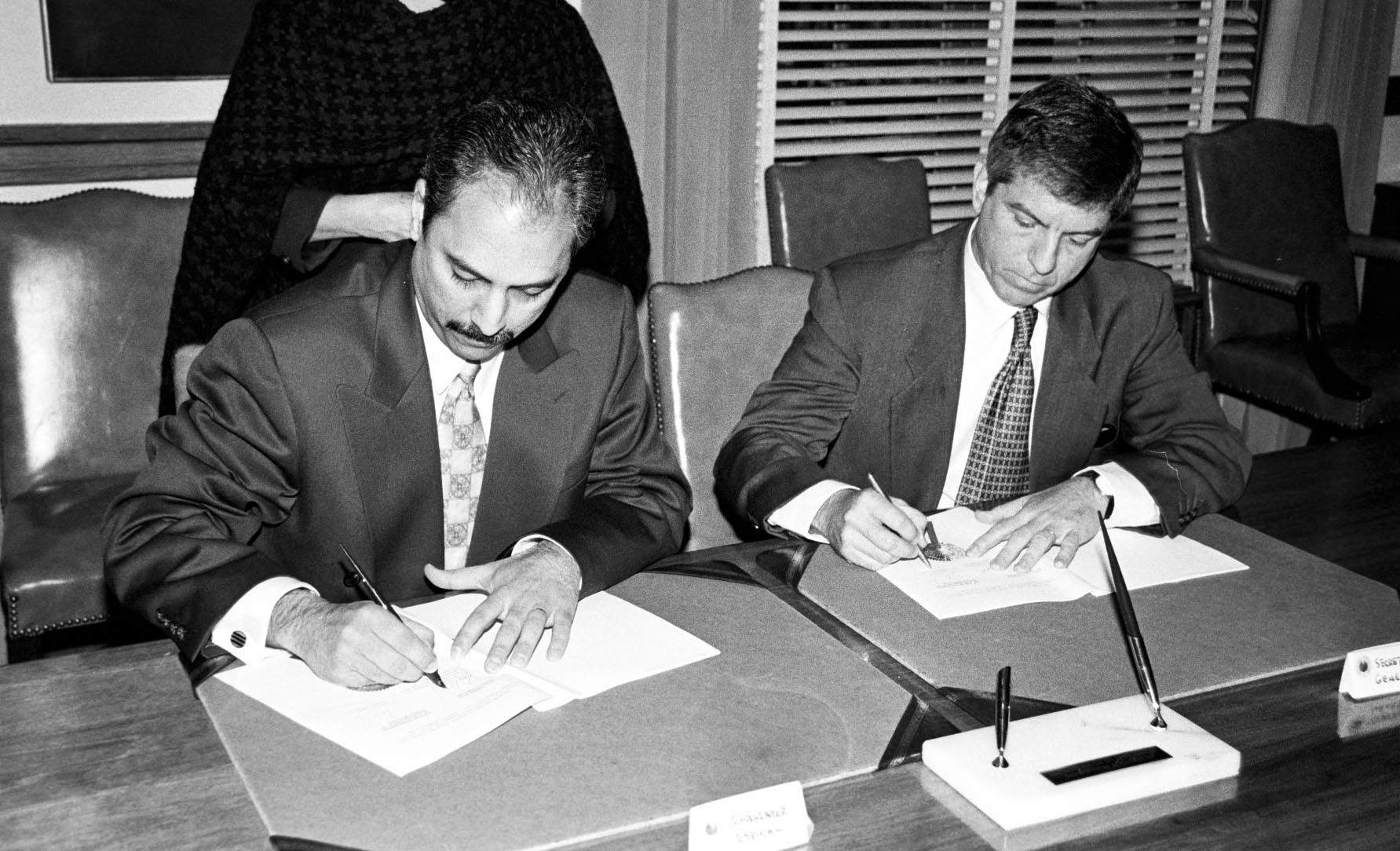 Firma de acuerdo de observación entre el gobierno de la República Dominicana y la Secretaría General de la Organización de los Estados Americanos para las elecciones presidenciales del 16 de mayo del año 2000.